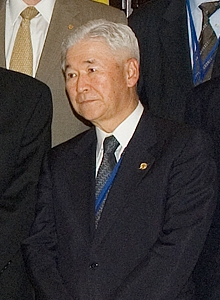 Toshihiko Fukui